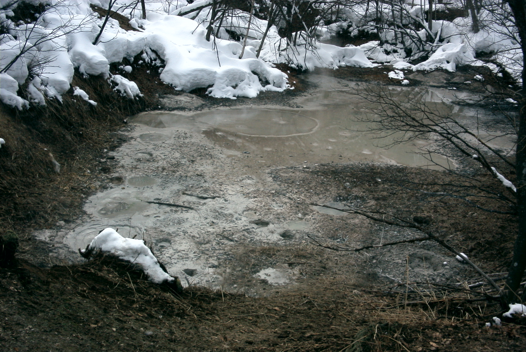 ボッケ(北海道阿寒湖畔の小規模泥火山)